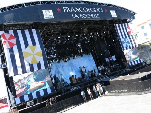 Photo de la nouvelle scène des Francofolies 2017 lors de la 33ème éditions des Francofolies de La Rochelle